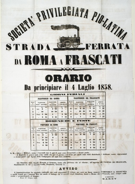 Orario della linea Roma-Frascati della Società privilegiata Pio-latina, articolato in giorni feriali, domeniche e festivi, 1858 (AS Roma, Ministero del commercio, belle arti, industria, agricoltura e lavori pubblici, b. 312, fasc. 16)